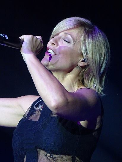 Michelle; 6. Mai 2016 Hannover "Das Beste der Feste"